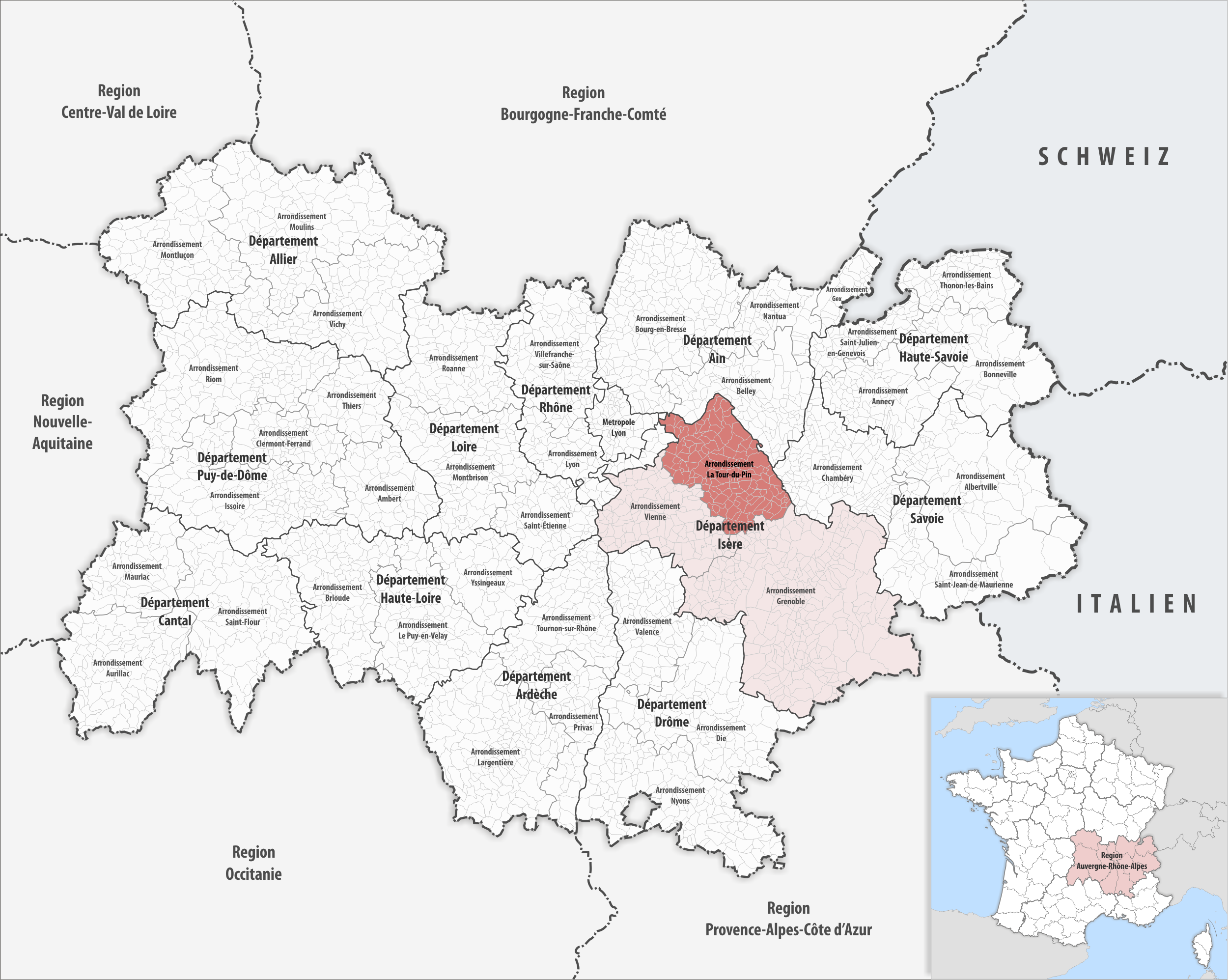 Lage des Arrondissements La Tour-du-Pin